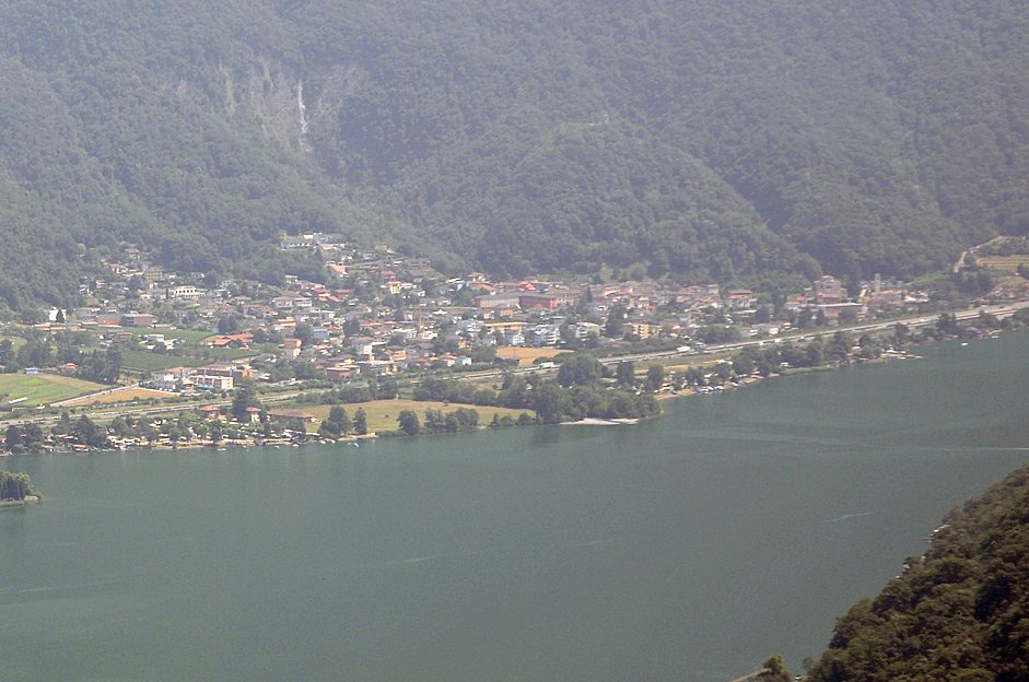 Melano, gesehen vom Monte San Salvatore